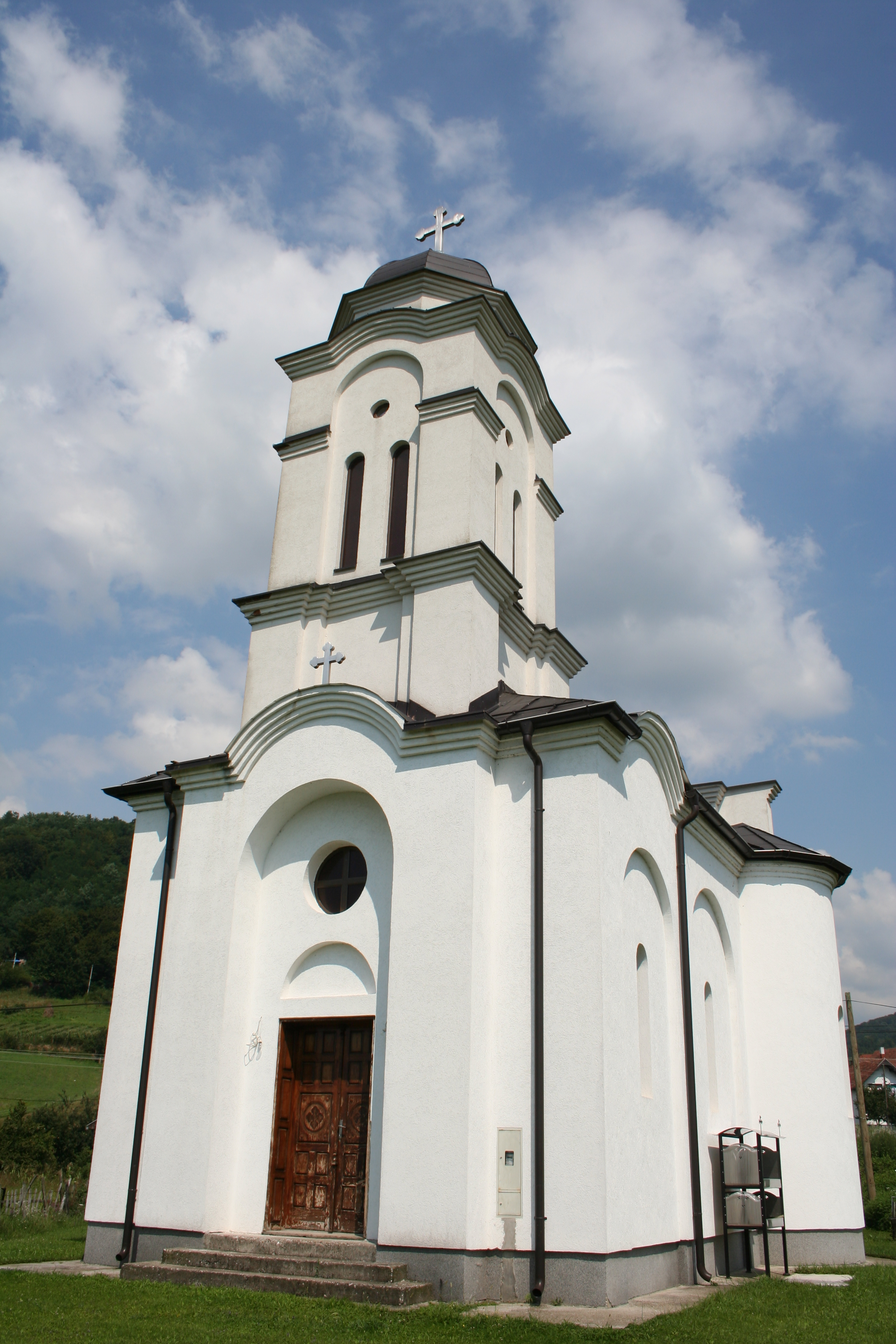 Crkva Vaskrsenja Gospodnjeg, Culine